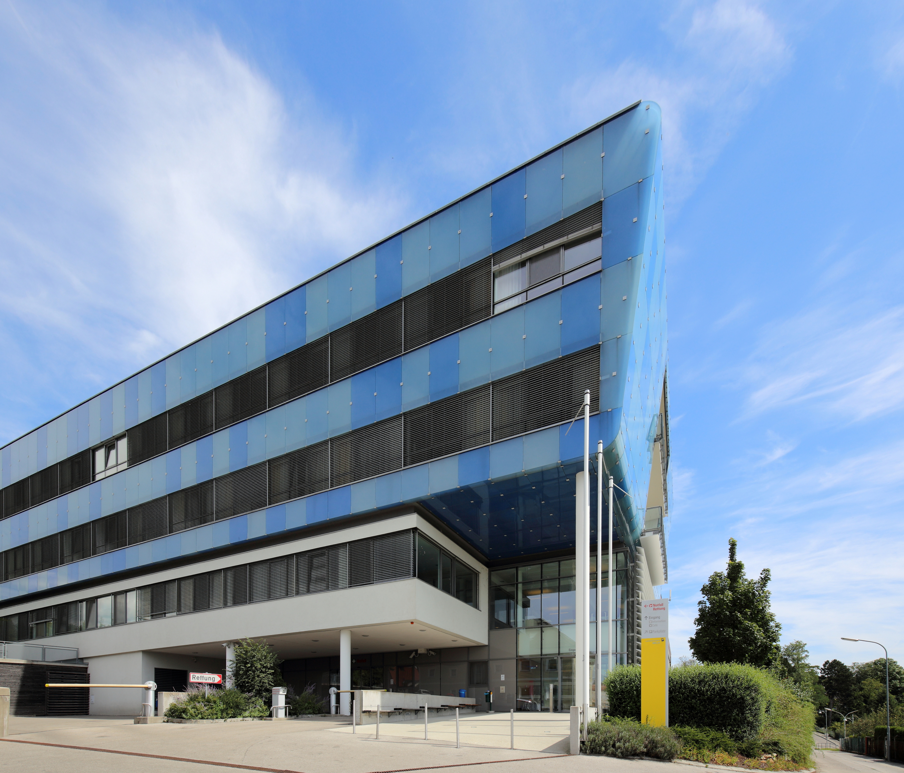 Der westliche Zubau des Landesklinikum Mostviertel Melk. Der viergeschossige Zubau wurde nach den Plänen des Architektenbüros Maurer & Partner ZT GmbH ab 2006 errichtet und 2008 eröffnet. Darin untergebracht sind zwei interdisziplinäre Bettenstationen, ein Schlaflabor, die Gynäkologie und Geburtshilfe samt Kreißsälen, Ambulanz- und Behandlungsräume. Der neue Westtrakt war ein wesentlicher Teil des Um- und Ausbaues des Klinikums, der von 2006 bis 2012 erfolgte und rund 54 Millionen Euro kostete.